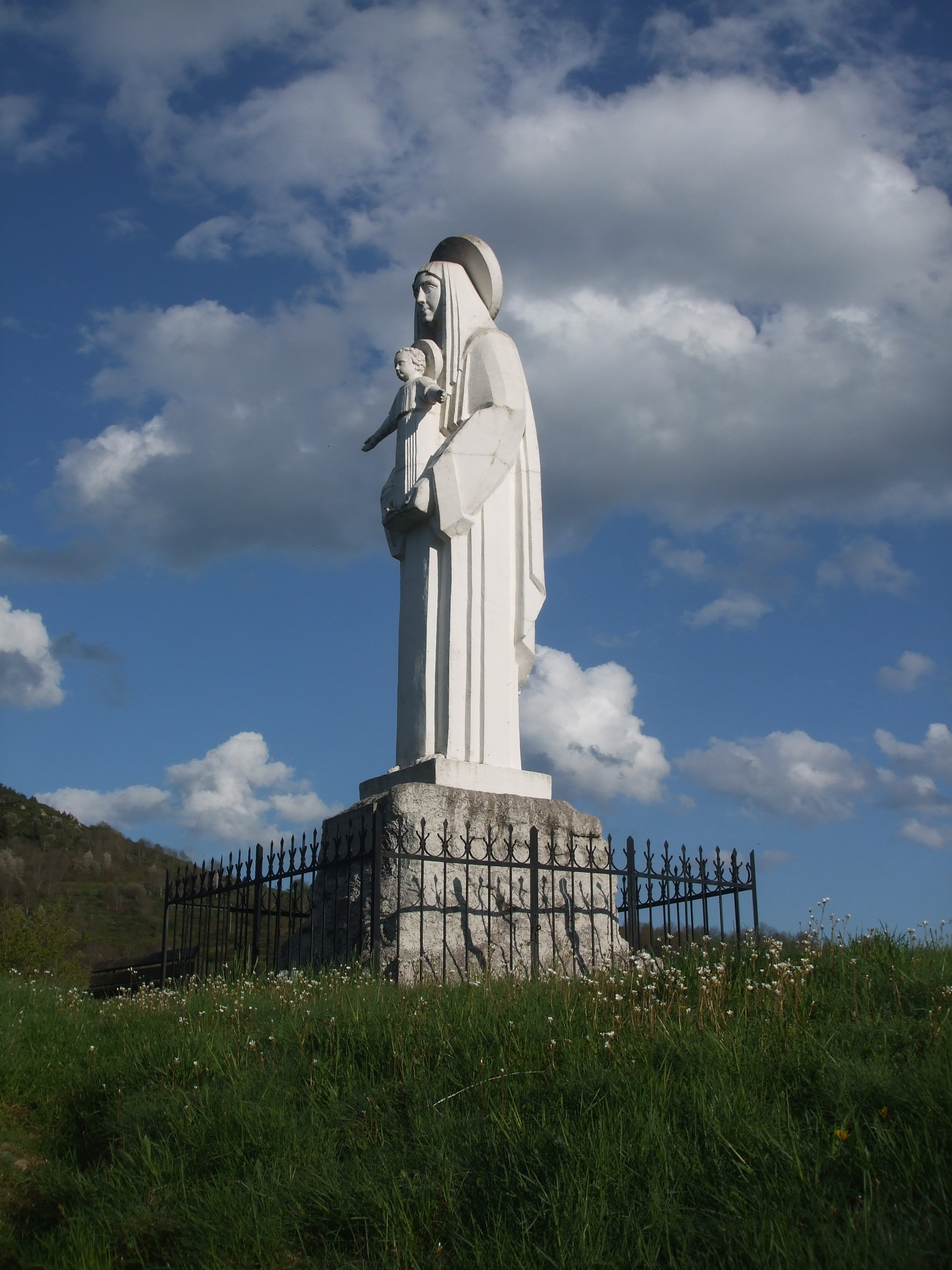 statue de la Vierge à l'enfant surplombant le village de Saint-Julien-Boutières (Ardèche)